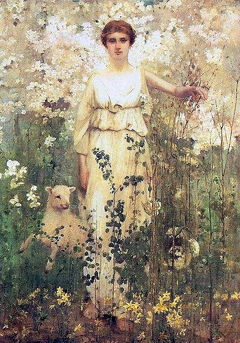 Spring